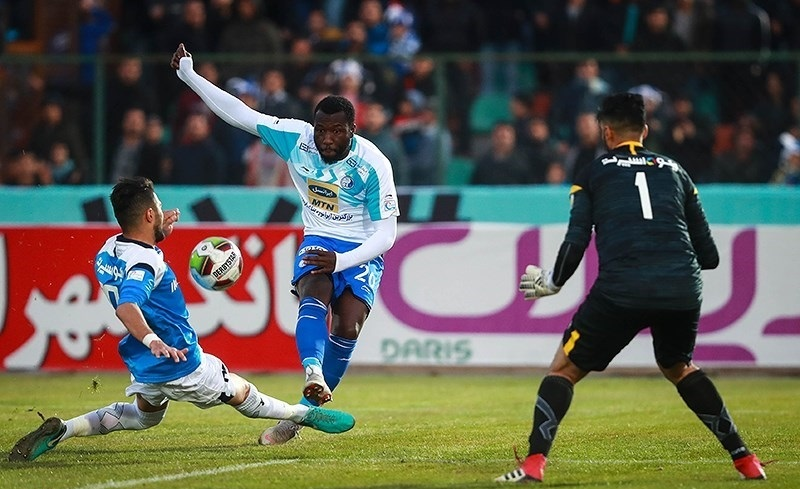 صحنه به ثمر رسیدن نخستین گل اسماعیل گنسالوس برای استقلال تهران مقابل پیکان